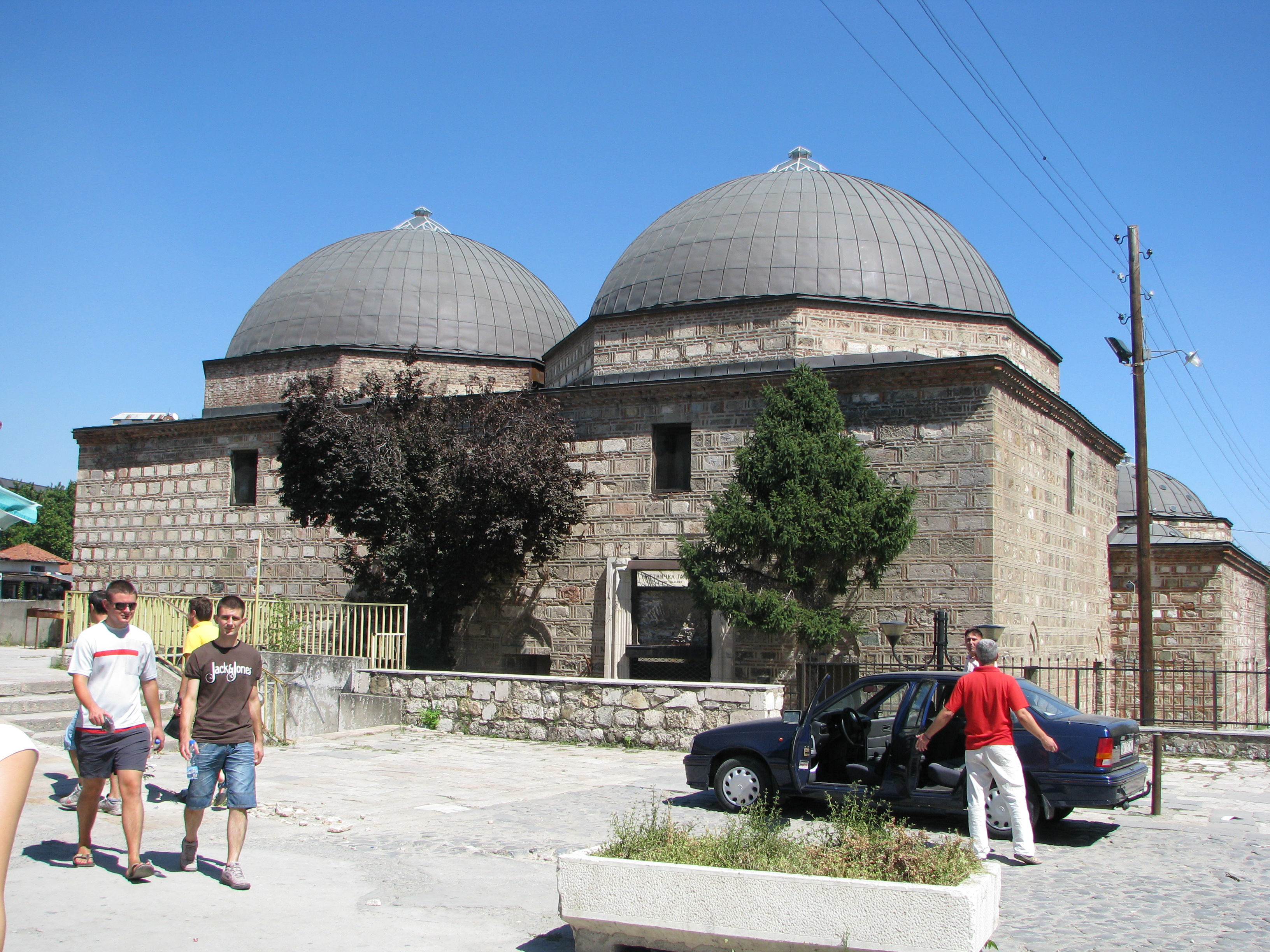 Daut pašin amam, Skopje